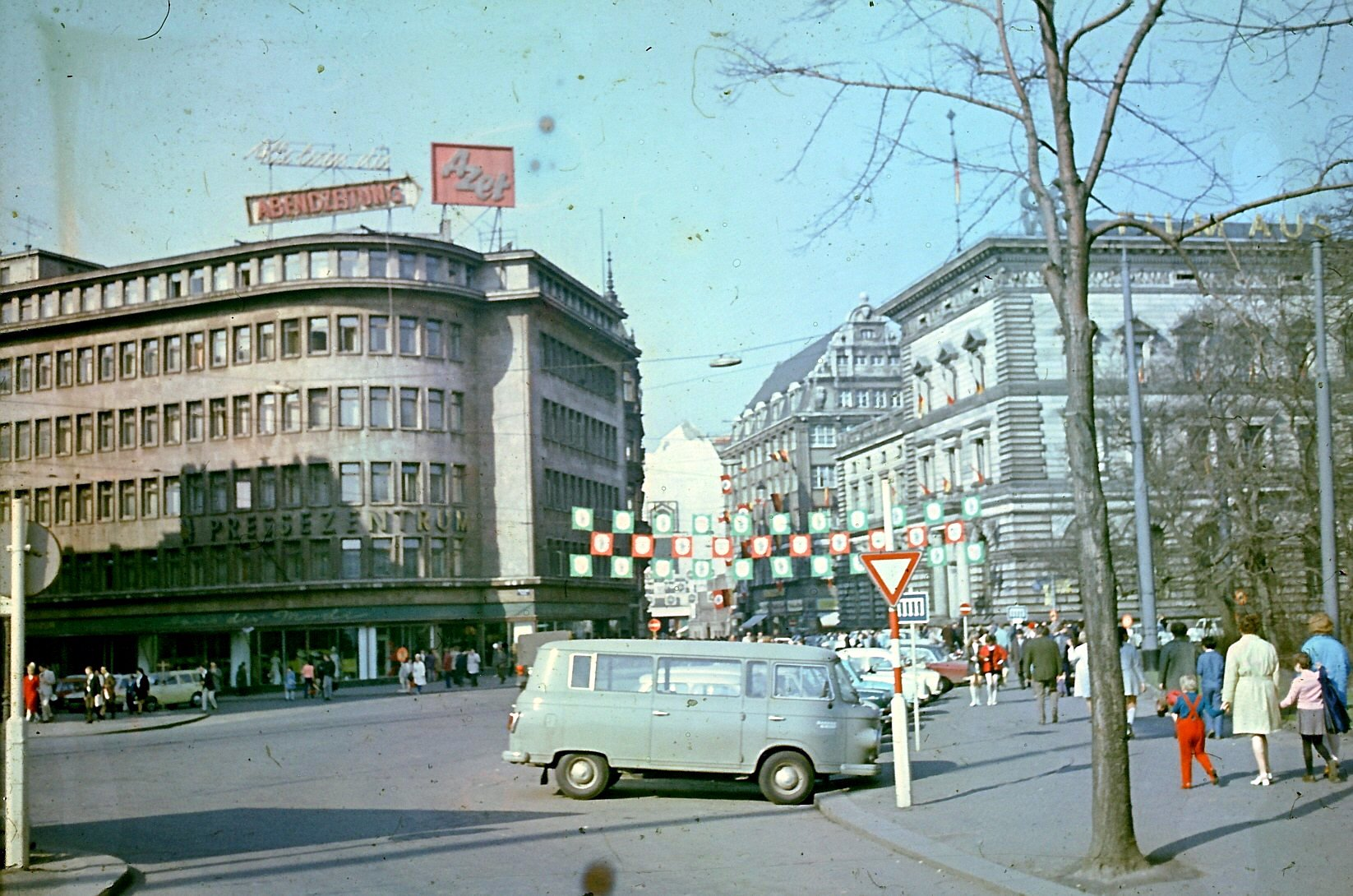 Blick auf die Petersstraße um 1975.